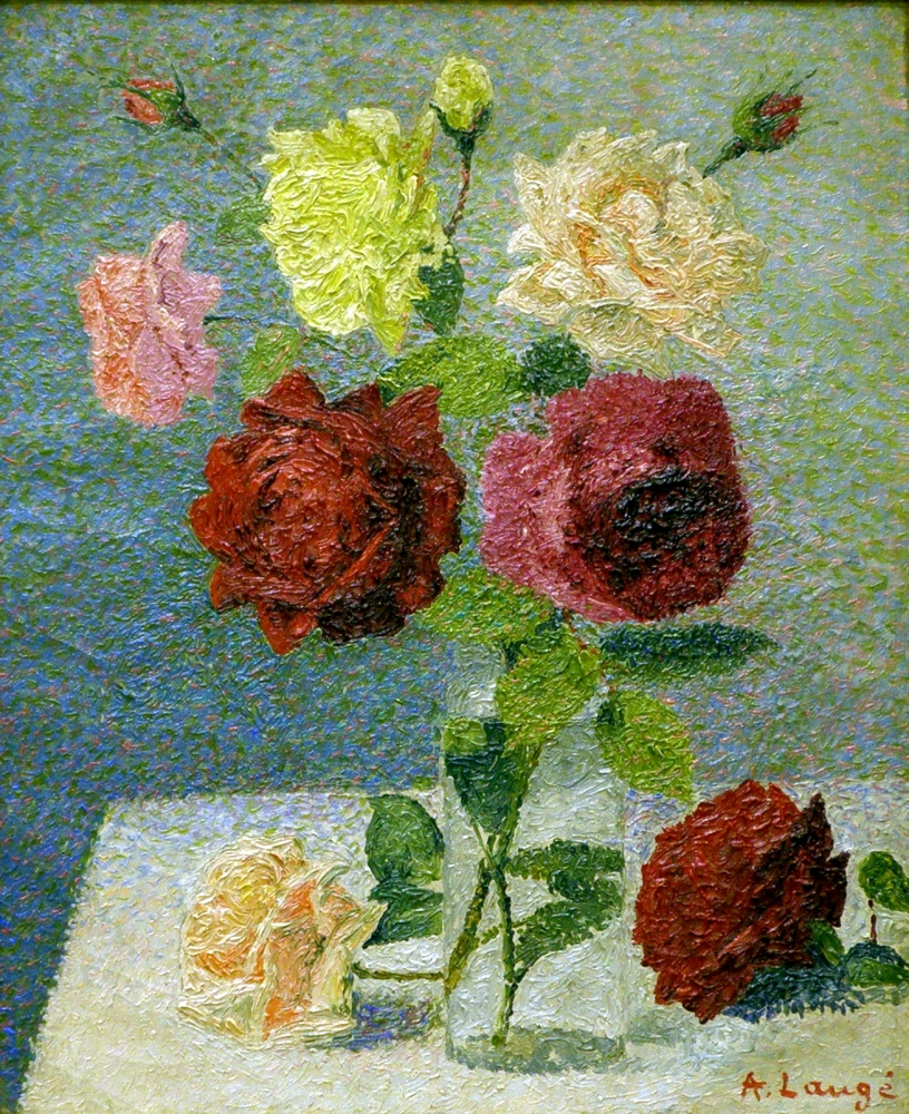 Achille Laugé (1861-1944) - Bouquet de roses